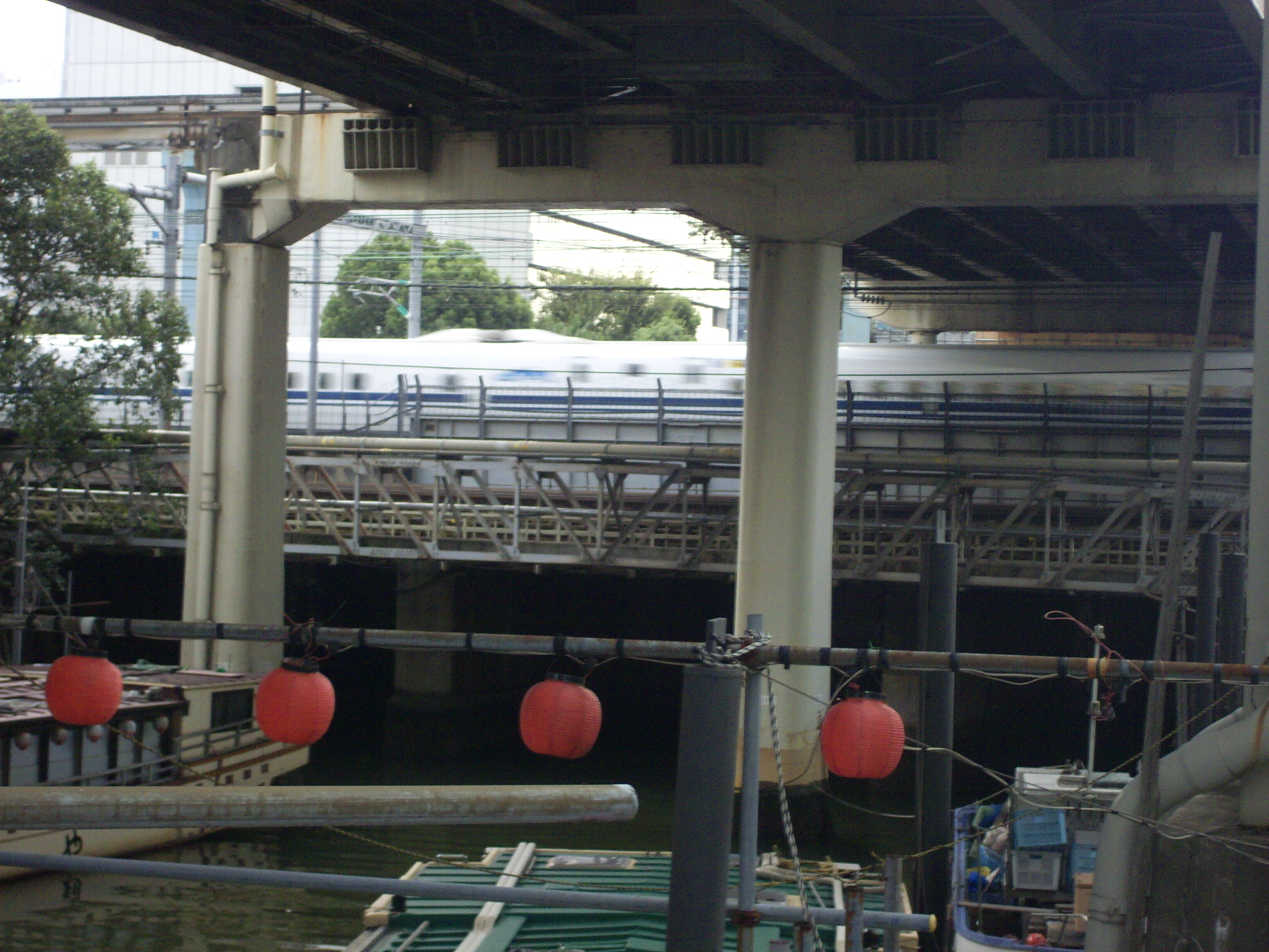 浜松町駅南側を流れる古川（渋谷川）を渡る鉄道橋（金杉橋）、手前から京浜東北線・山手線・東海道本線そして東海道新幹線が通過中。新幹線部分は溝渠構造で桁橋ではないため、河川橋梁には区分されていない。頭上は首都高速都心環状線。一帯は東京湾屋形船の船着場になっている。 ㊟カメラを起動すると日付機能が出荷時のものに初期化されるため、ファイル履歴の投稿日時とメタデータの原画像データの生成日時が異なります（本概要欄の下記日付が撮影日）